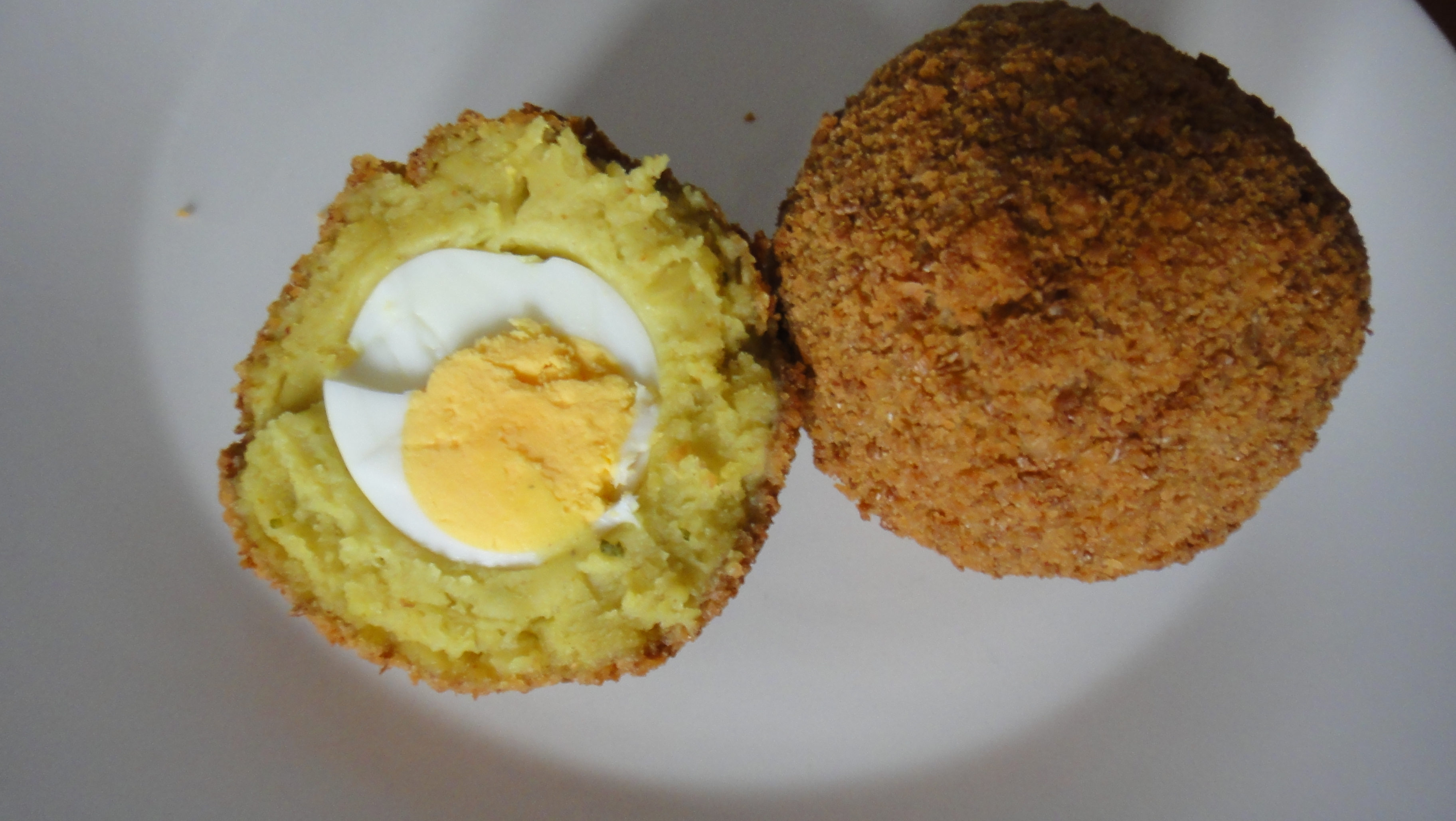 Een halve eierbal met ernaast een hele